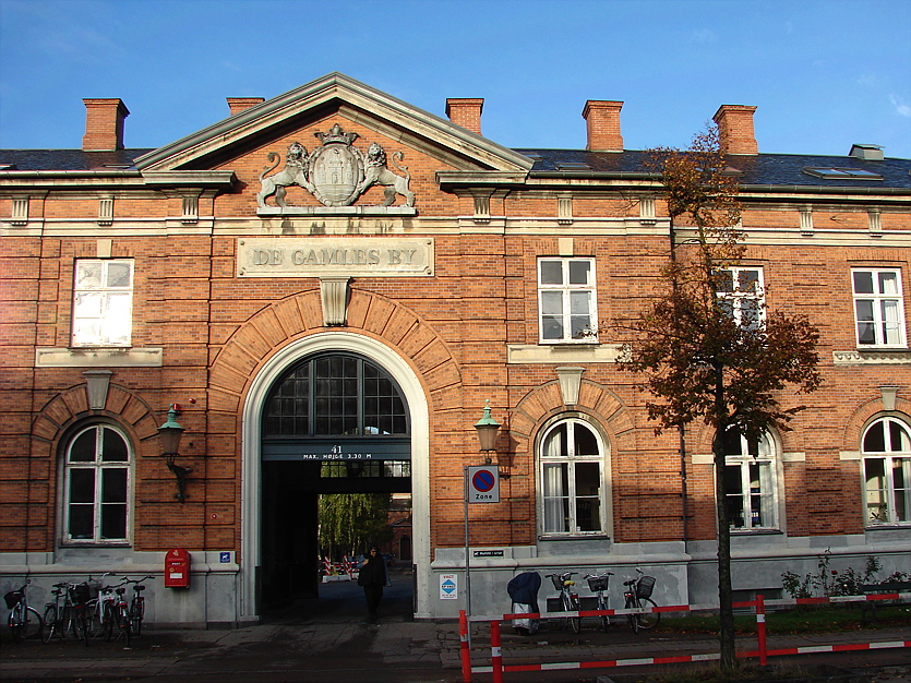 De Gamles By, Nørrebro, København